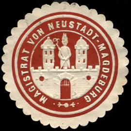 Sealing stamp Title: Magistrat von Neustadt - Magdeburg Description: rotbraun, weiß, geprägt Place: Neustadt / Magdeburg size: 4 cm